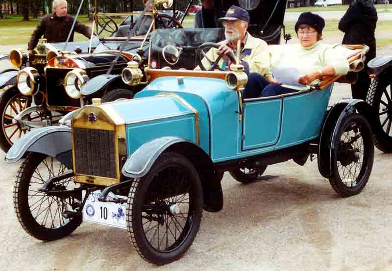 Swift 7 HP 1913